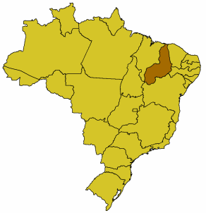 Karte Brasiliens, Piauí hervorgehoben, GFDL nach der Vorlage Bild:Brasilien Bundesstaaten.png